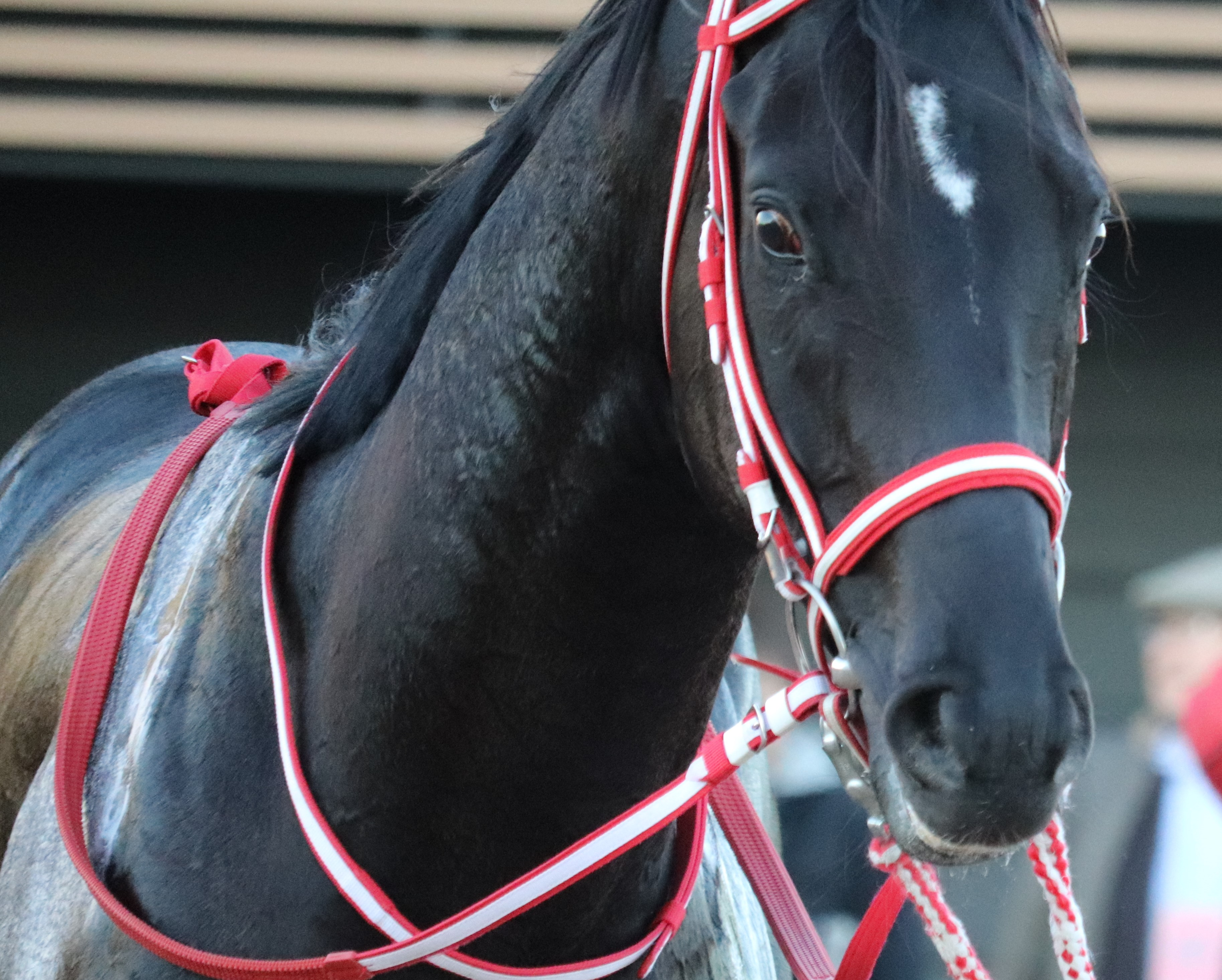 2019年のホープフルステークス、コントレイルの顔